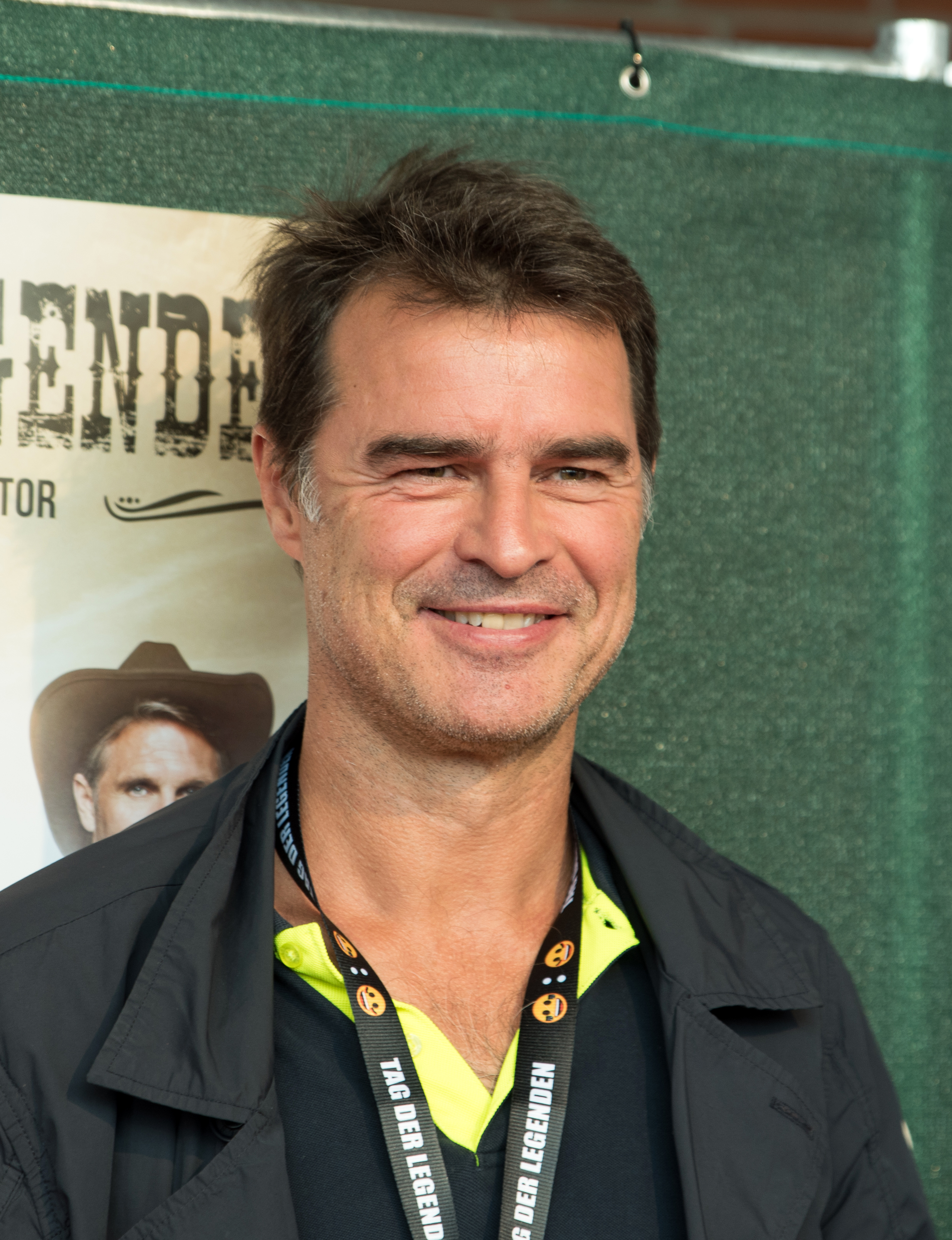 Thomas Berthold beim Tag der Legenden 2016